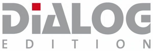 Wortmarke des Kleinverlags Dialog Edition des Vereins Dialog e. V. – Gesellschaft für deutsch-türkischen Dialog, Duisburg